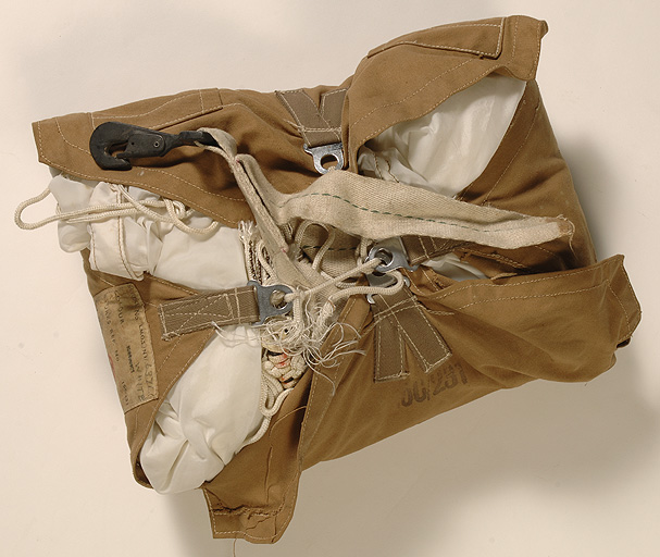 Toile de parachute pliée dans son sac marron, muni de sangles et de crochets.